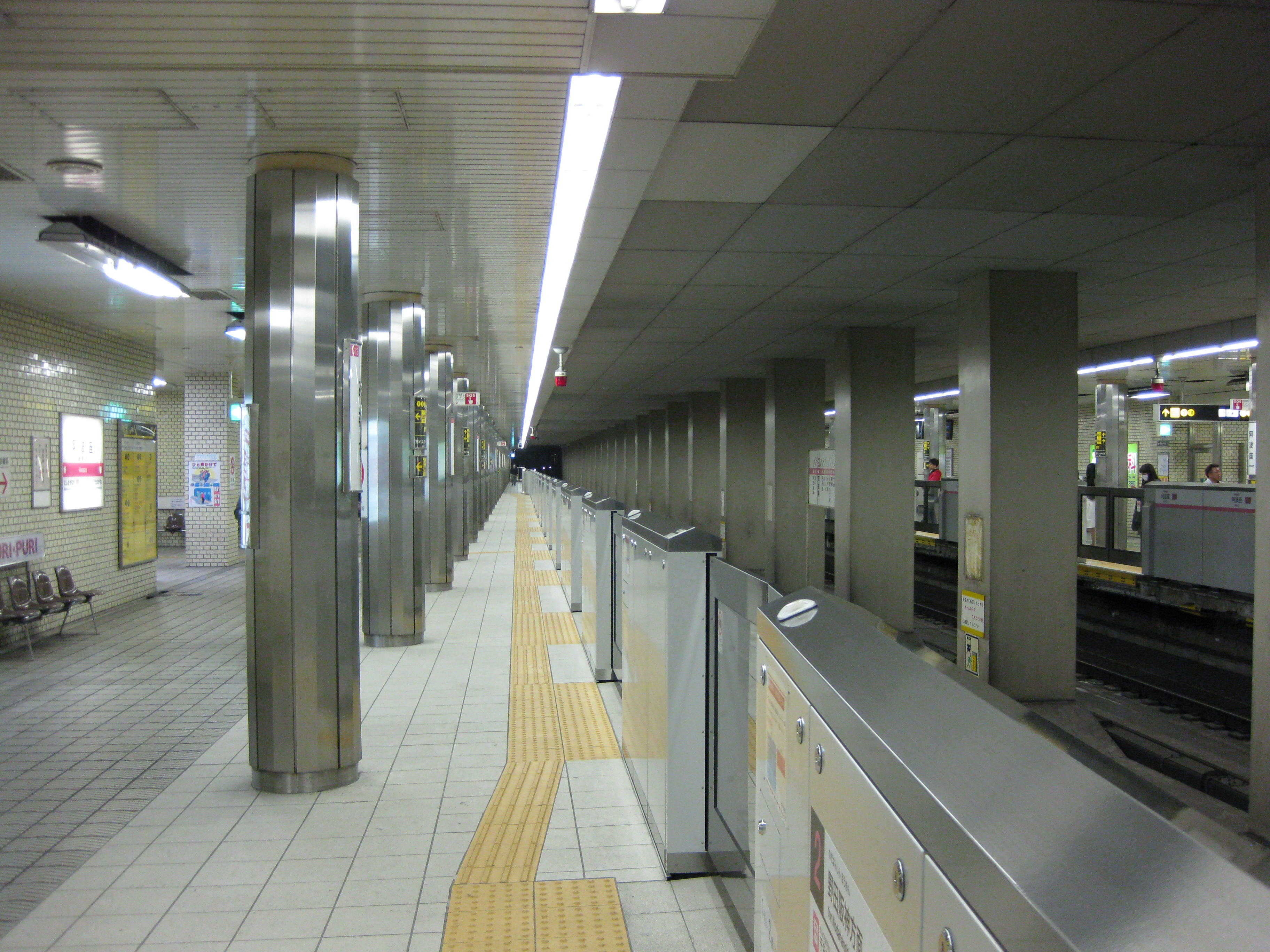 阿波座駅千日前線プラットホーム